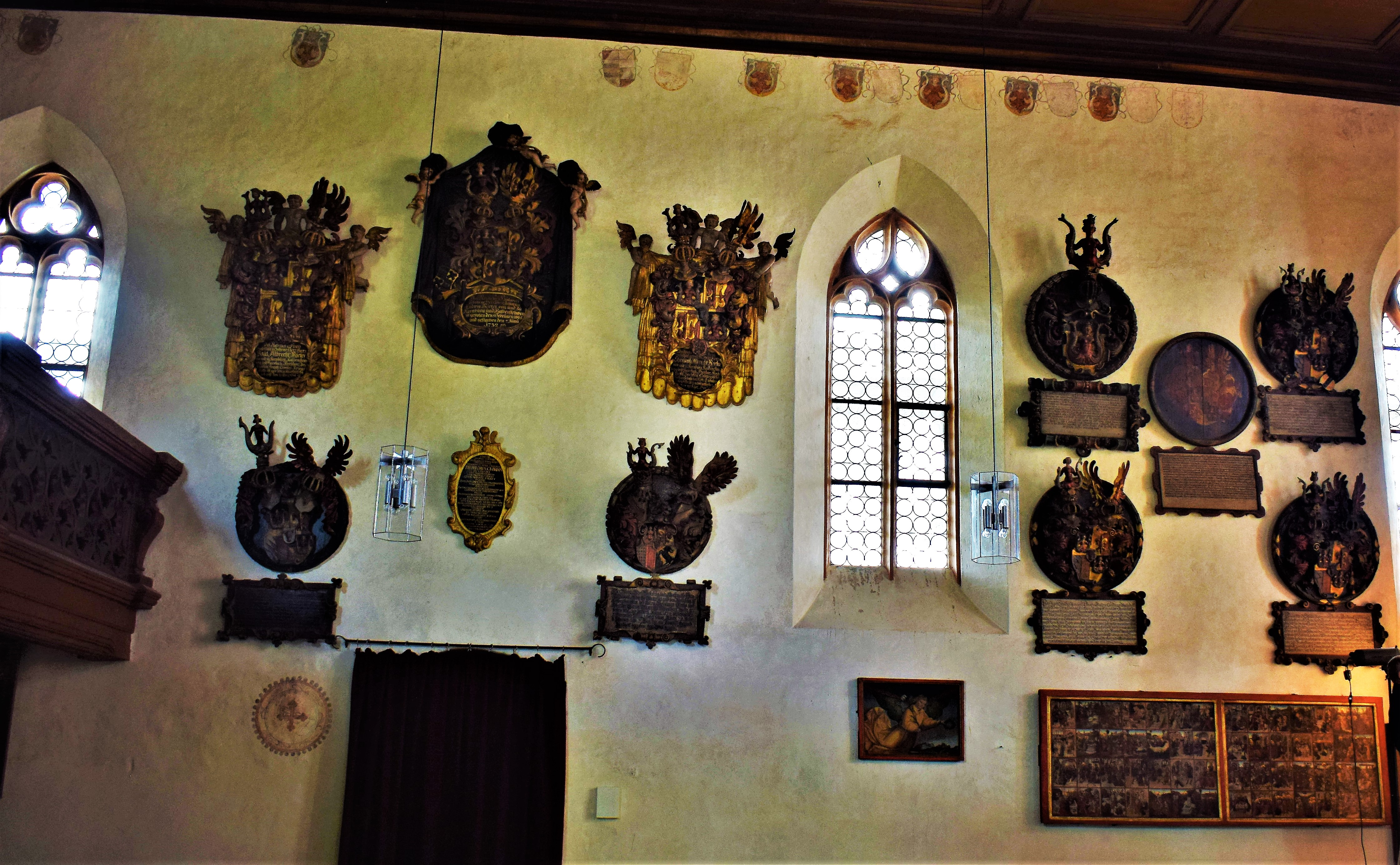 Rieterkirche Kalbensteinberg: 10 Totenschilde an der Nordwand des Langhauses